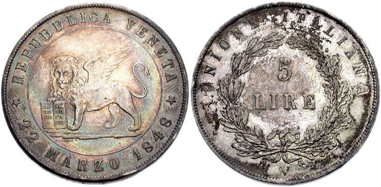 Italia (Stati Italiani preunitari), Venezia. Moneta Rivolutionaria. 1848-1849. AR 5 Lire (37mm, 25.07 g, 5h). Zecca di Venezia. Datata 1848 V. REPUBBLICA VENETA* 22 MARZO 1848. Leone nimbato ed alato sin., testa di fronte, la zampa anteriore dx. tiene il libro con la scritta PAX/TIBI/MAR/CE// EVAN/CELI/STA/MEUS UNIONE ITALIANA intorno ad una corona di alloro e quercia, 5/LIRE dentro. Italy (Italian States), Venice. Revolutionary Issues. 1848-1849. AR 5 Lire (37mm, 25.07 g, 5h). Venice mint. Dated 1848 V. REPUBBLICA VENETA* 22 MARZO 1848. Winged nimbate lion left, head facing, his right paw supporting tablets inscribed PAX/TIBI/MAR/CE// EVAN/CELI/STA/MEUS UNIONE ITALIANA aroound wreath, 5/LIRE within. KM 186. Italian pre-unification coins